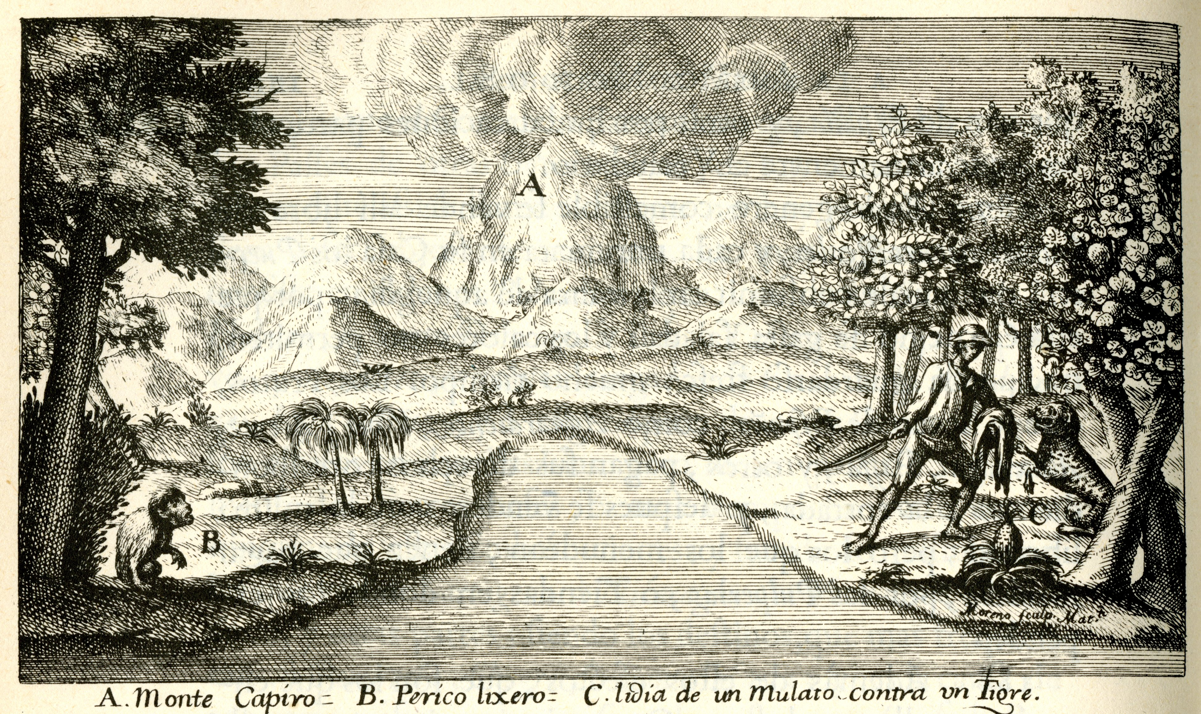 De Ulloa, Antonio y Jorge Juan. Relación Histórica del Viaje a la América Meridional, hecho de Orden de Su Majestad Católica para medir algunos Grados de Meridiano Terrestre, y venir por ellos en conocimiento de la verdadera Figura y Magnitud de la Tierra, con otras varias Observaciones Astronómicas y Físicas. Por Don Jorge Juan Comendador de Aliaga, en la Orden de San Juan, Socio correspondiente de la Real Academia de las Ciencias de París; y Don Antonio de Ulloa de la Real Sociedad de Londres: ambos por Capitanes de Fragata de la Real Armada. Primera Parte / Tomo I. Impresa por la Orden del Rey Nuestro Señor en Madrid por Antonio Marín, Año de MCDDXLVIII (1748). Diapositiva de Consulta y acceso publico cuya información fue investigada de un libro y/o ejemplar de revisión custodiado en los Fondos Bibliográficos (Sección Siglo XVIII o Etapa Colonial) del Archivo Histórico del Guayas; Guayaquil, Ecuador